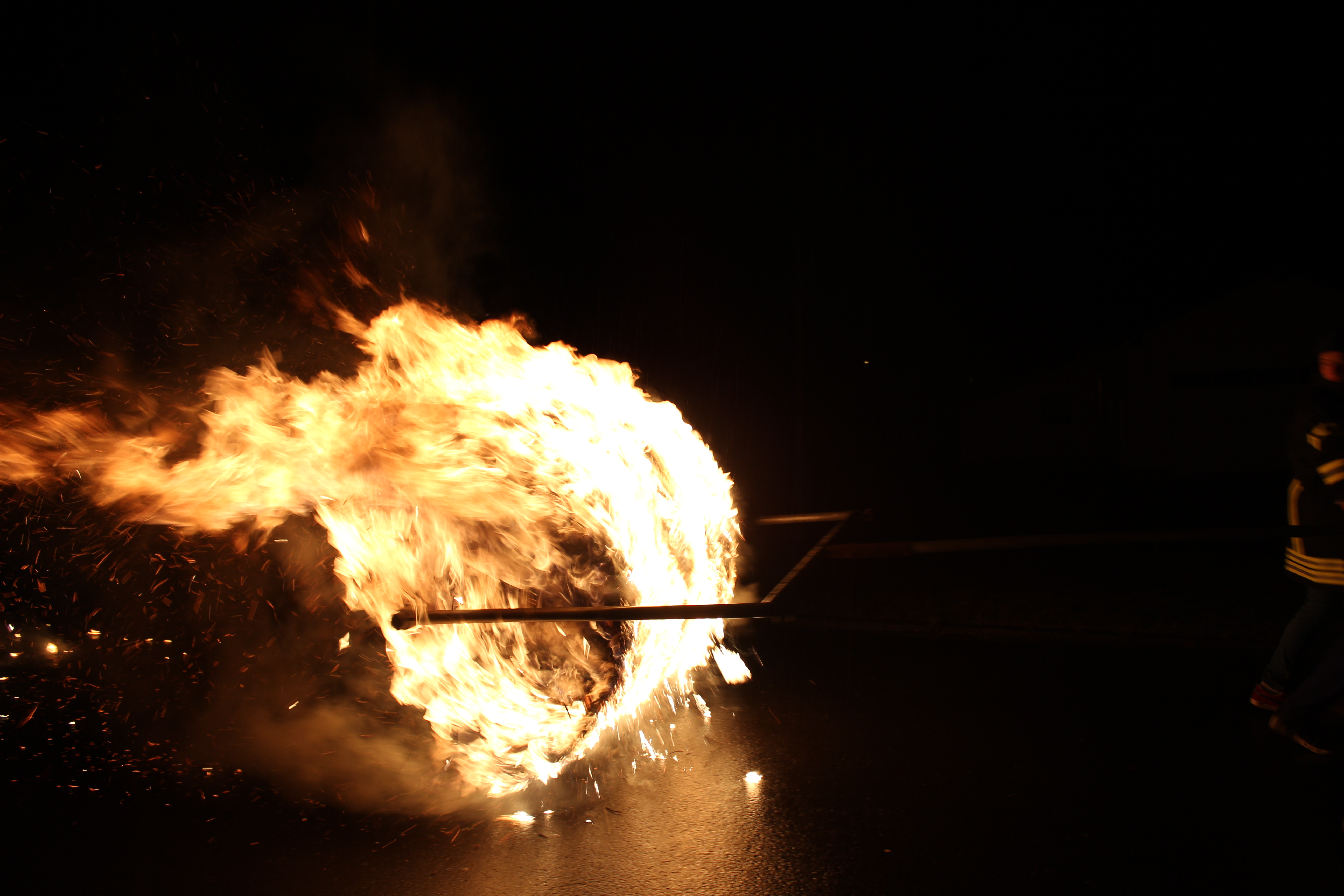 54597 Steffeln, Am Steffelberg. Die Junggesellen rollen am Vorabend des ersten Fastensonntages ein brennendes Feuerrad, das sogenannte "Freudenrad", vom Abhang des Steffelberges hinab in Tal. Das brennende Rad ist das Symbol für die Sonne, die mit ihrer Wärme den Winter vertreiben soll. Aufnahme von 2017.